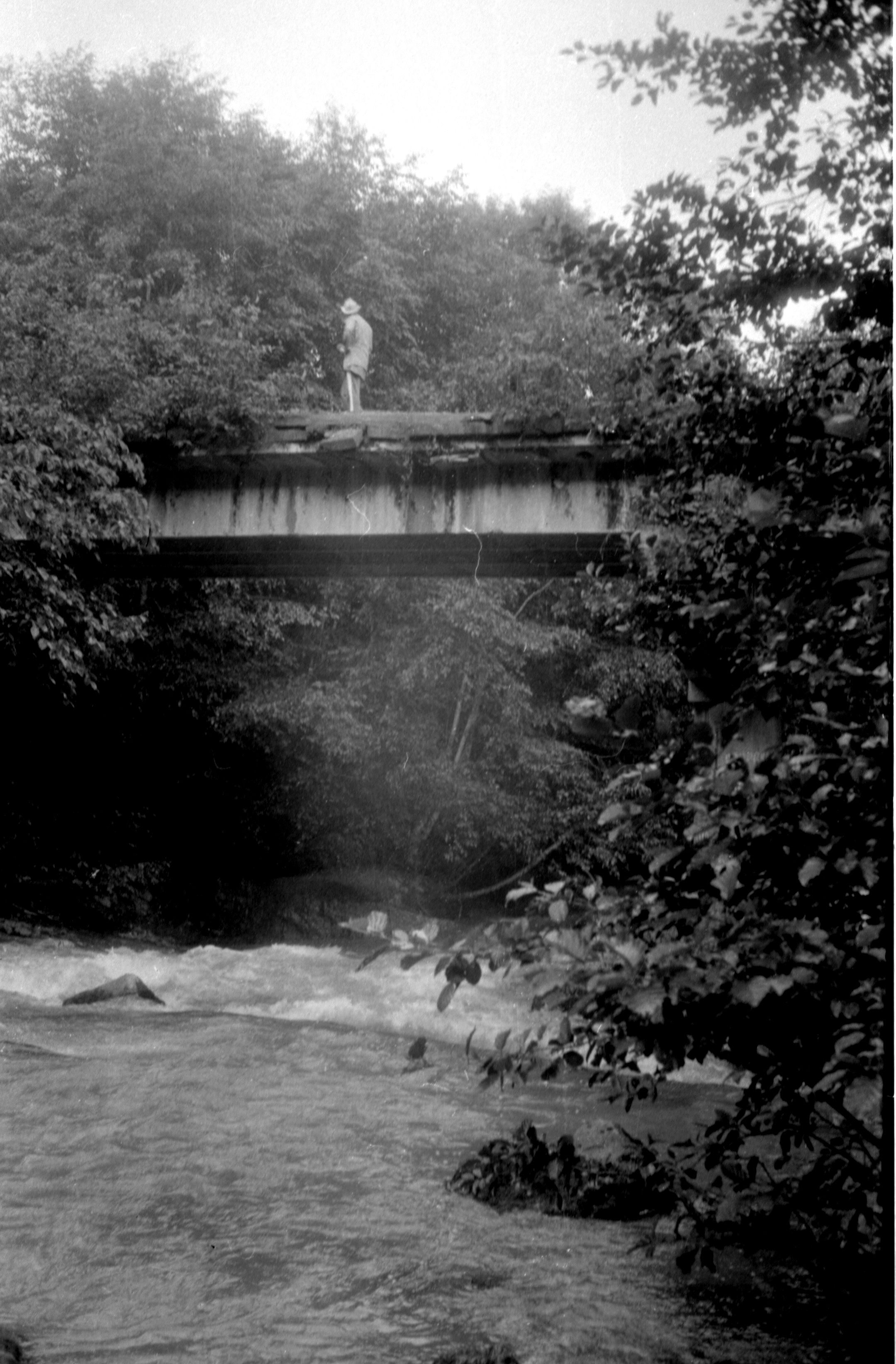 Мост через курджипс